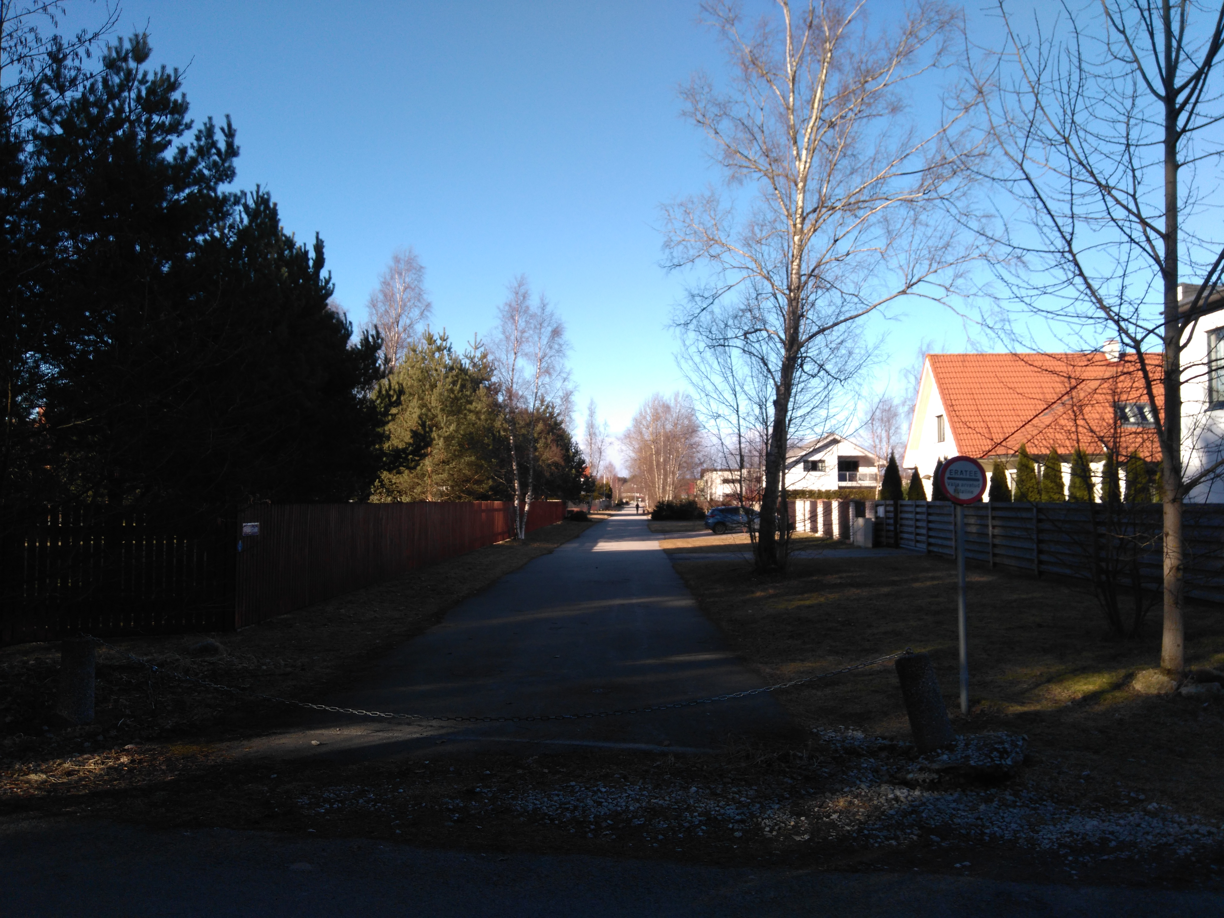 Põllumäe tänav